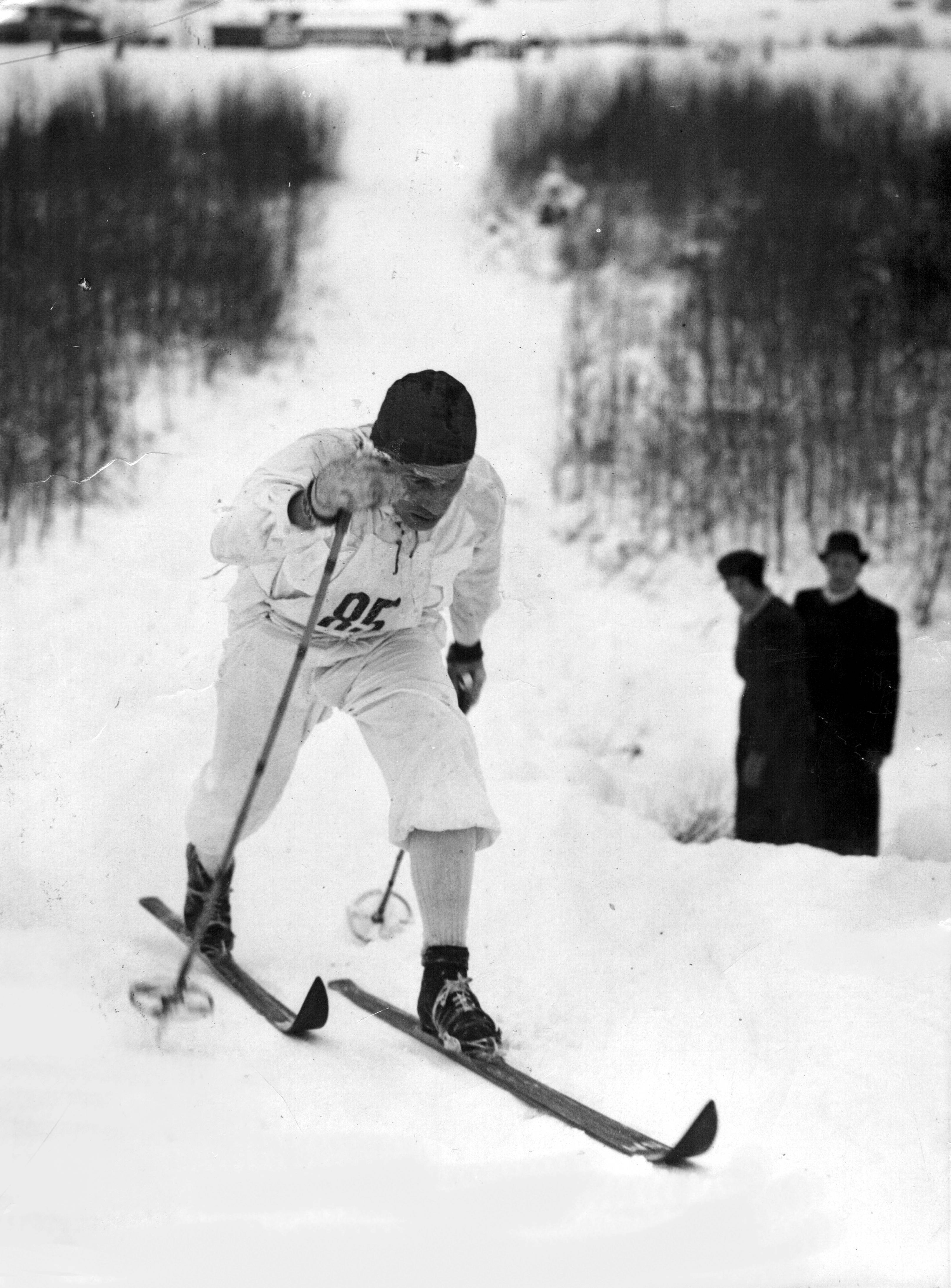 Alfred "Håsjö" Dahlqvist utvecklade diagonalstilen som han visar prov på här.